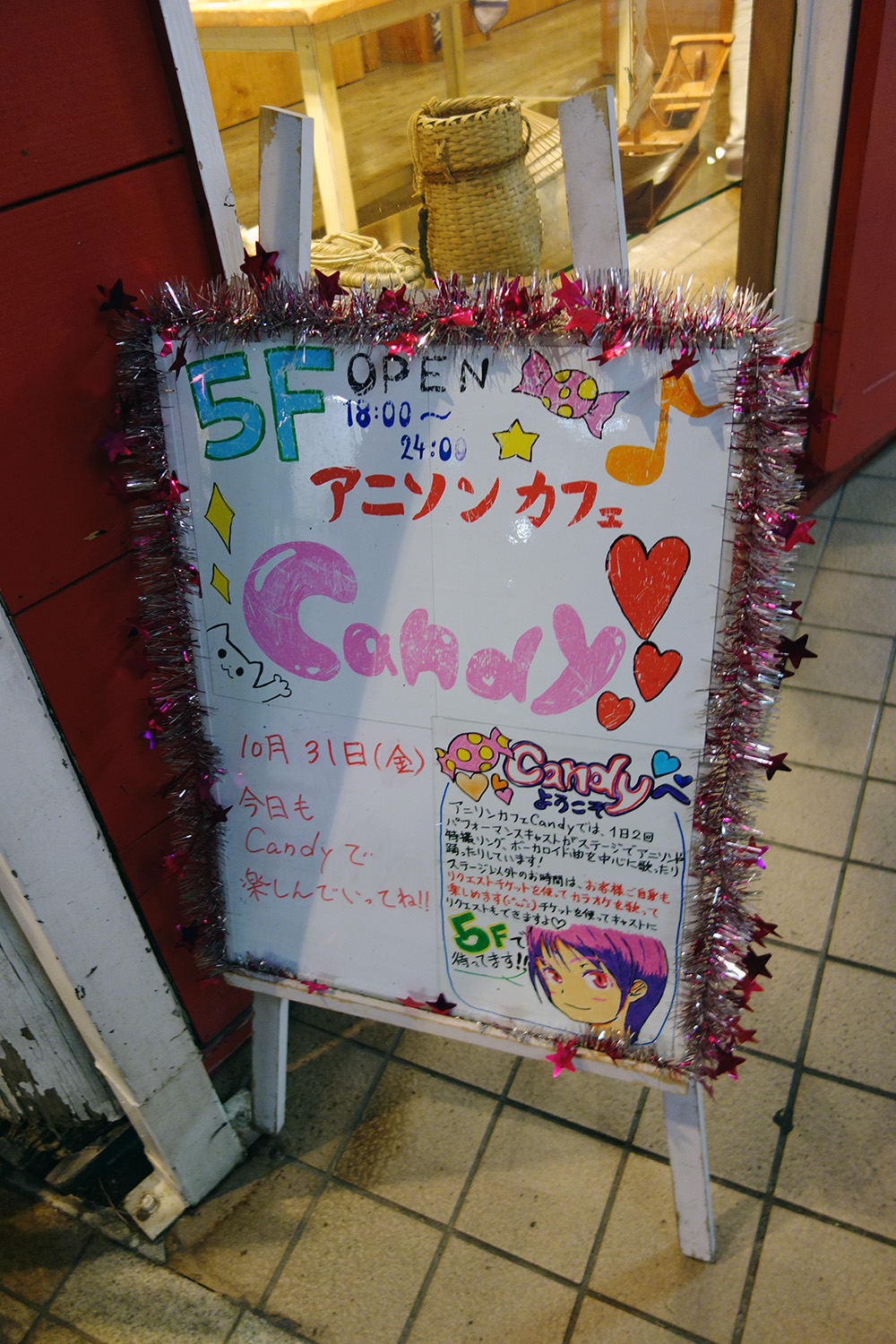 Entertainment Cafe Candy의 입간판